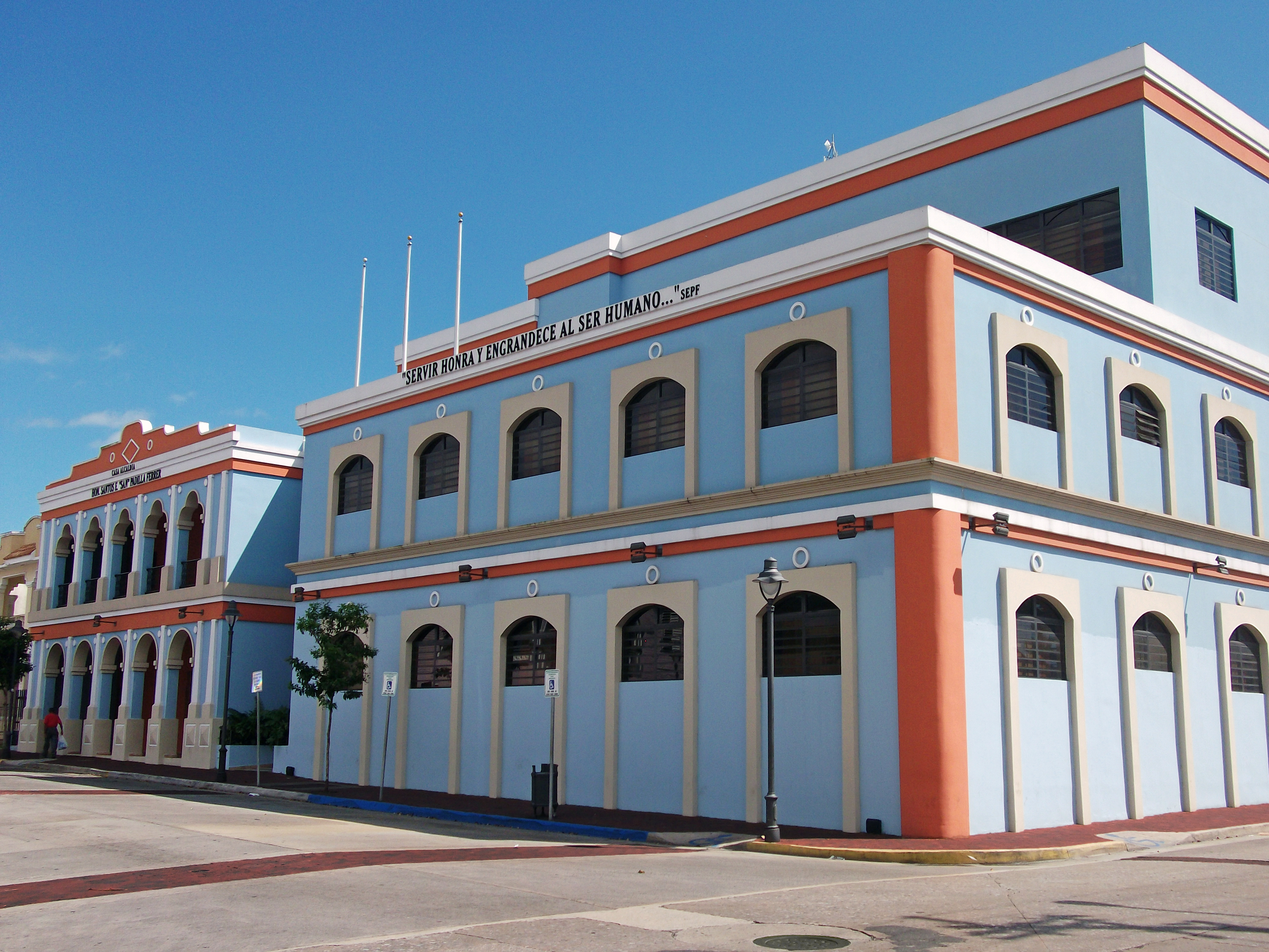 Alcaldía